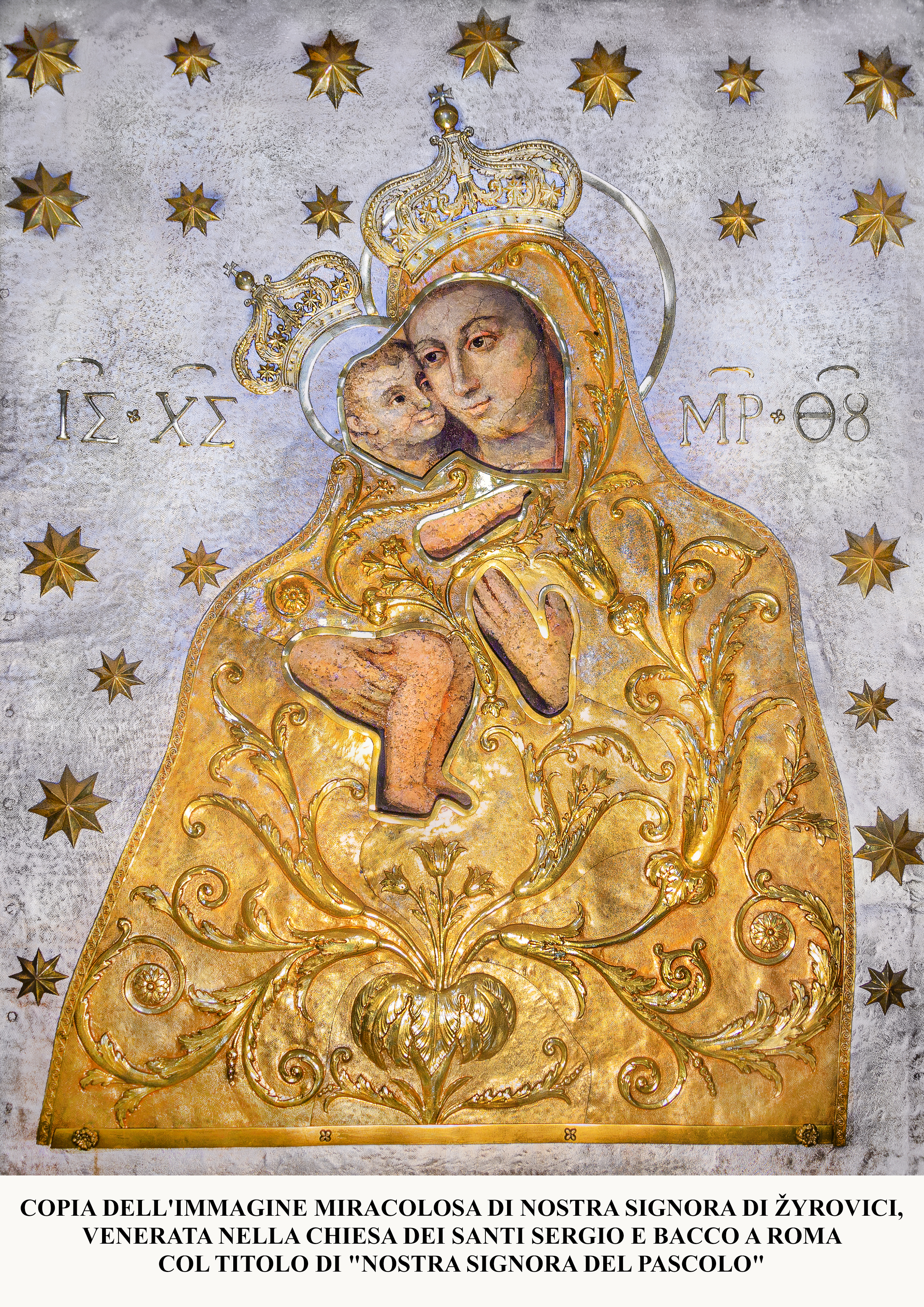 Чудотворна копія Жировицької ікони Прясвятої Богородиці, яка знаходиться в Українській парафії святих мучеників Сергія і Вакха в Рмі